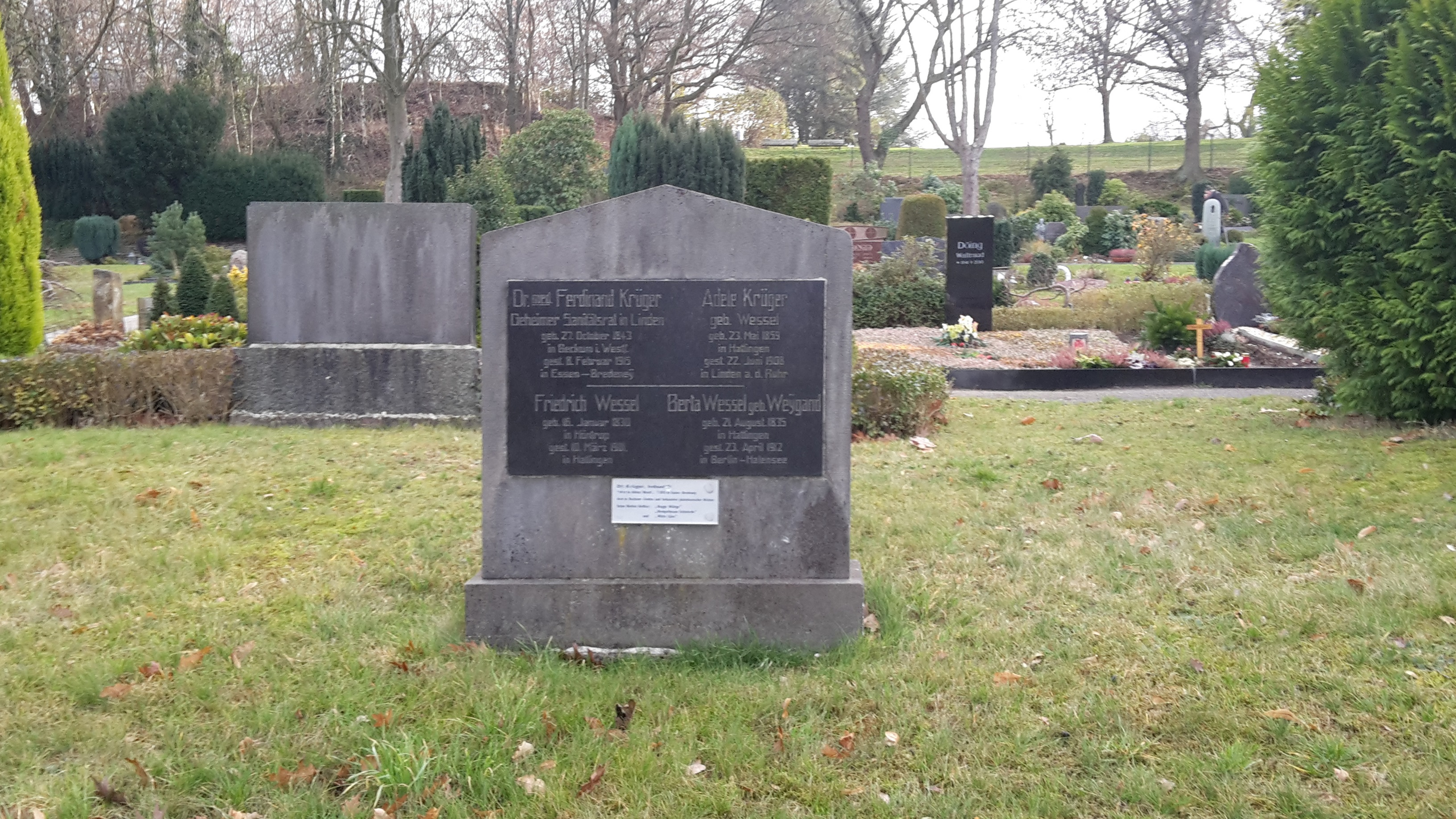 Grabstein der Sanitätsrats Ferdinand Krüger und Familie, auf dem "Grabsteinmuseum" im Evangelischen Friedhof Hattingen